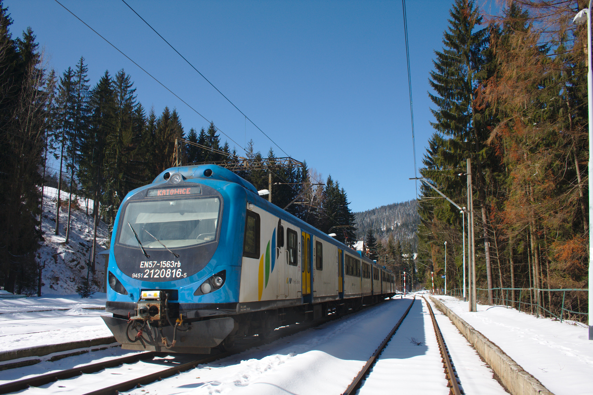 Elektryczny zespół trakcyjny EN57AKŚ-1563 w malowaniu przewoźnika Koleje Śląskie na stacji kolejowej Wisła Głębce.